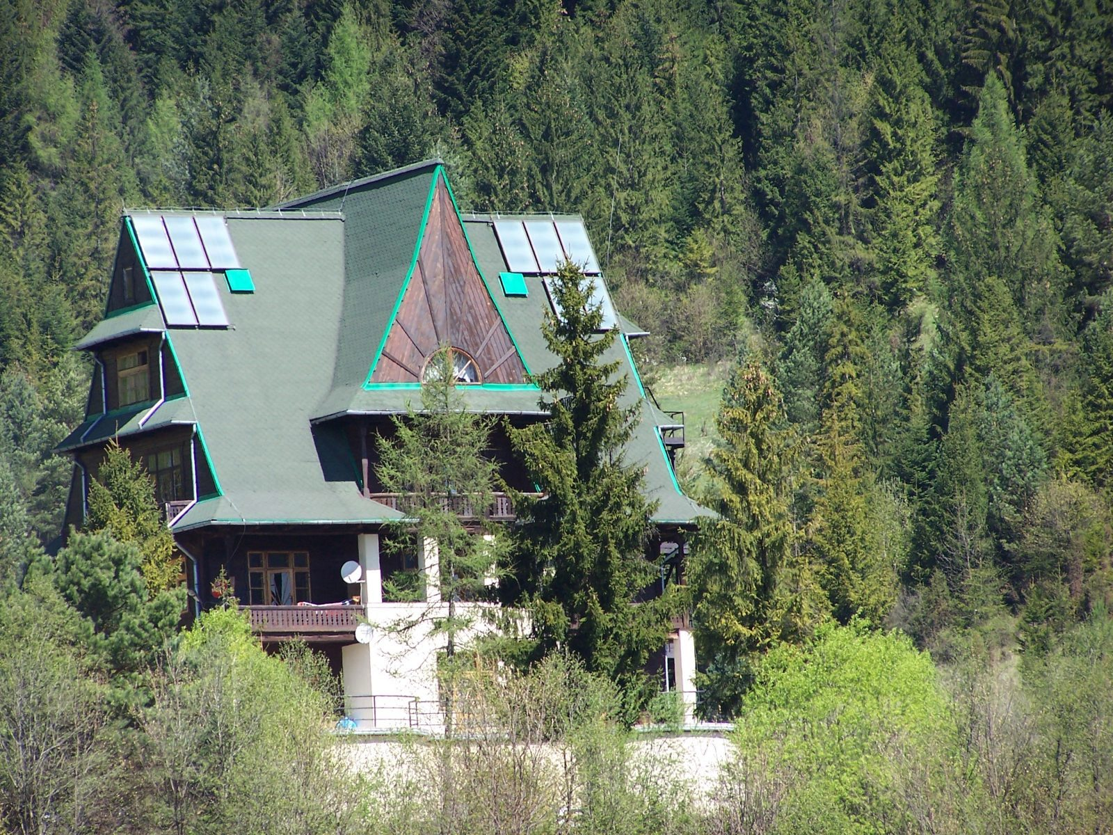 Schronisko PTTK Trzy Korony (Pieniny)